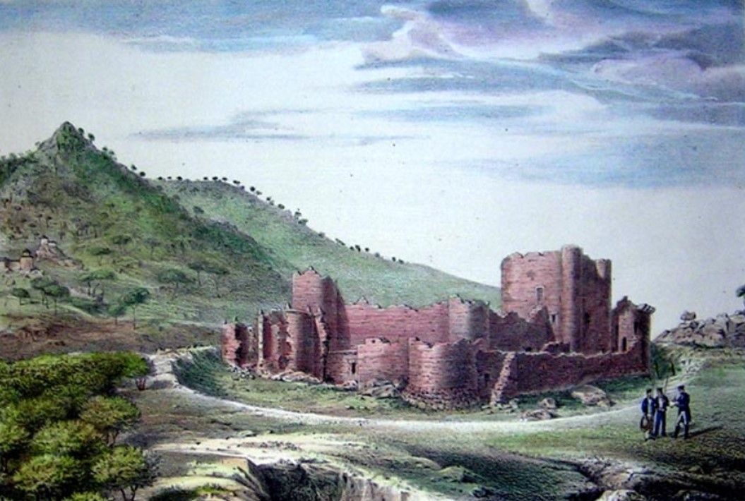 Castillo de Sn. Martin de Valdeyglesias (San Martín de ValdeIglesias, Madrid, España). Grabado de Isidoro Salcedo publicado en "Castillos y tradiciones feudales de la Península Ibérica", de José Bisso.